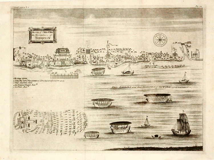 Cảnh Kẻ Chợ vào thế kỷ 17. Hình do Samuel Baron vẽ năm 1685. Tác giả đã mất trên 100 năm.